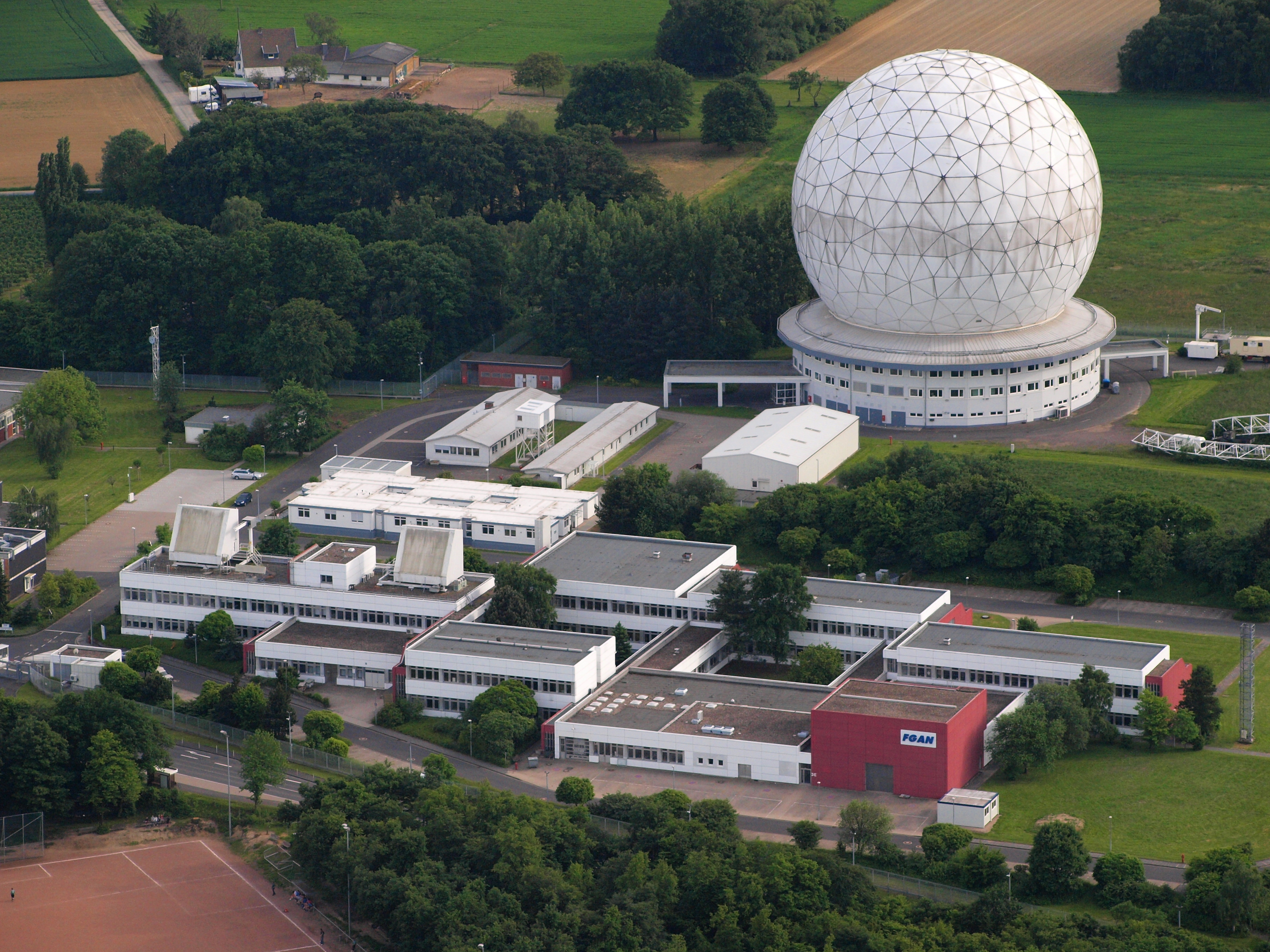 Radom der FGAN, Wachtberg: Luftaufnahme